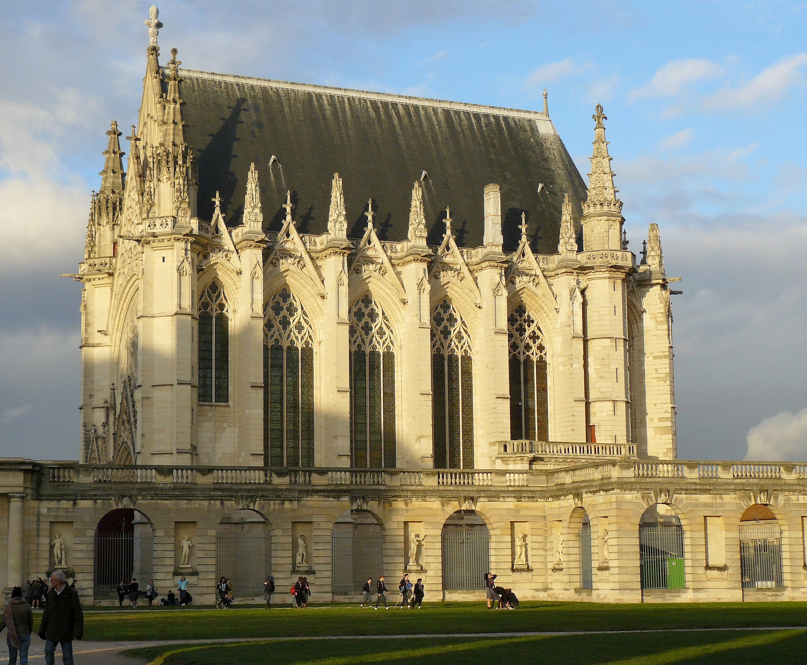 Sainte-Chapelle du château de Vincennes, éclairage de janvier 16h45